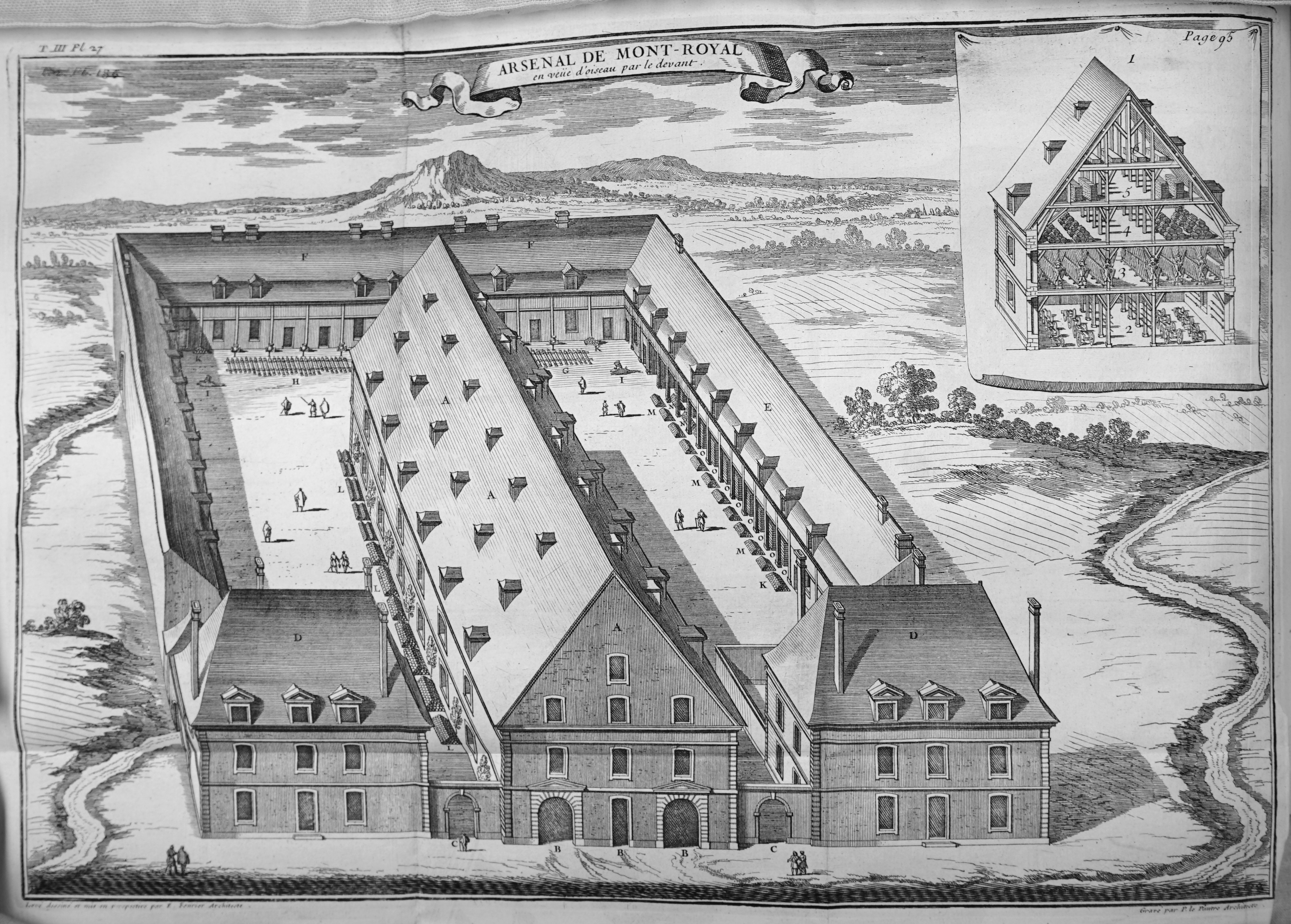 Mémoires d'artillerie, recueillis par M. Surirey de Saint Remy, tome III, exemplaire de la B.M. de Reims, troisième édition.